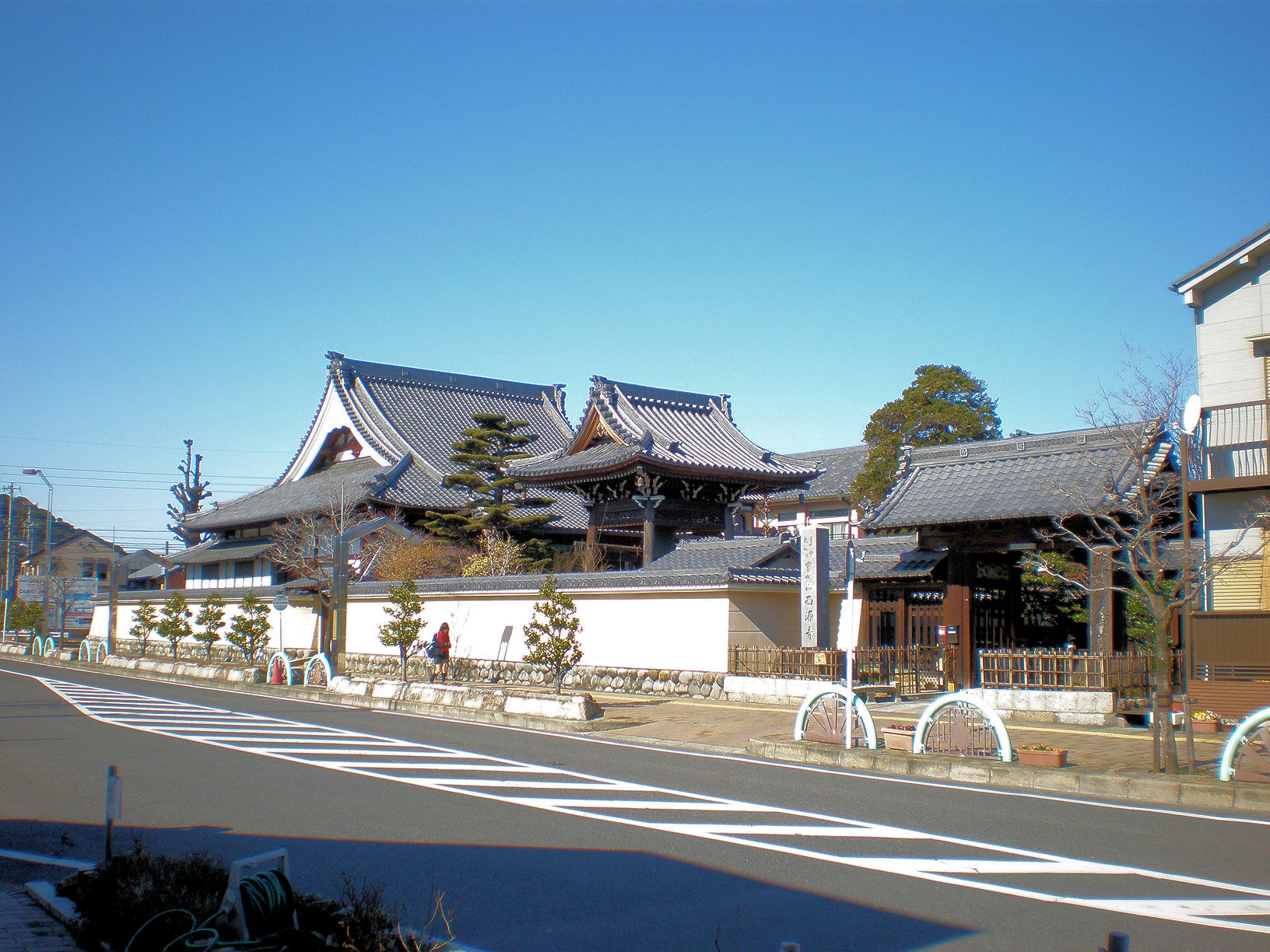 愛知県小牧市にある西源寺